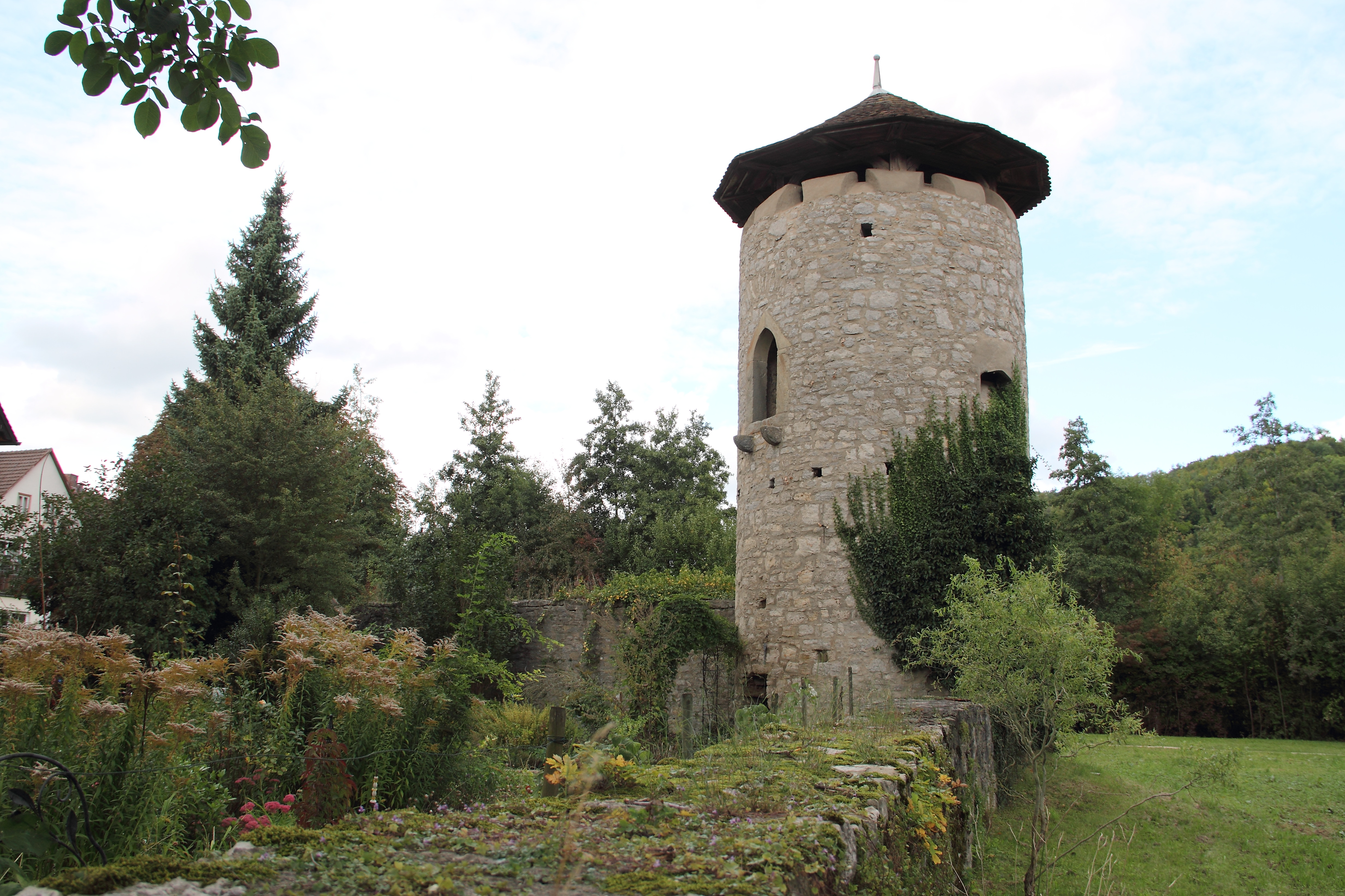 Am Grabenschied mit dem Fuchsturm in Niederstetten.